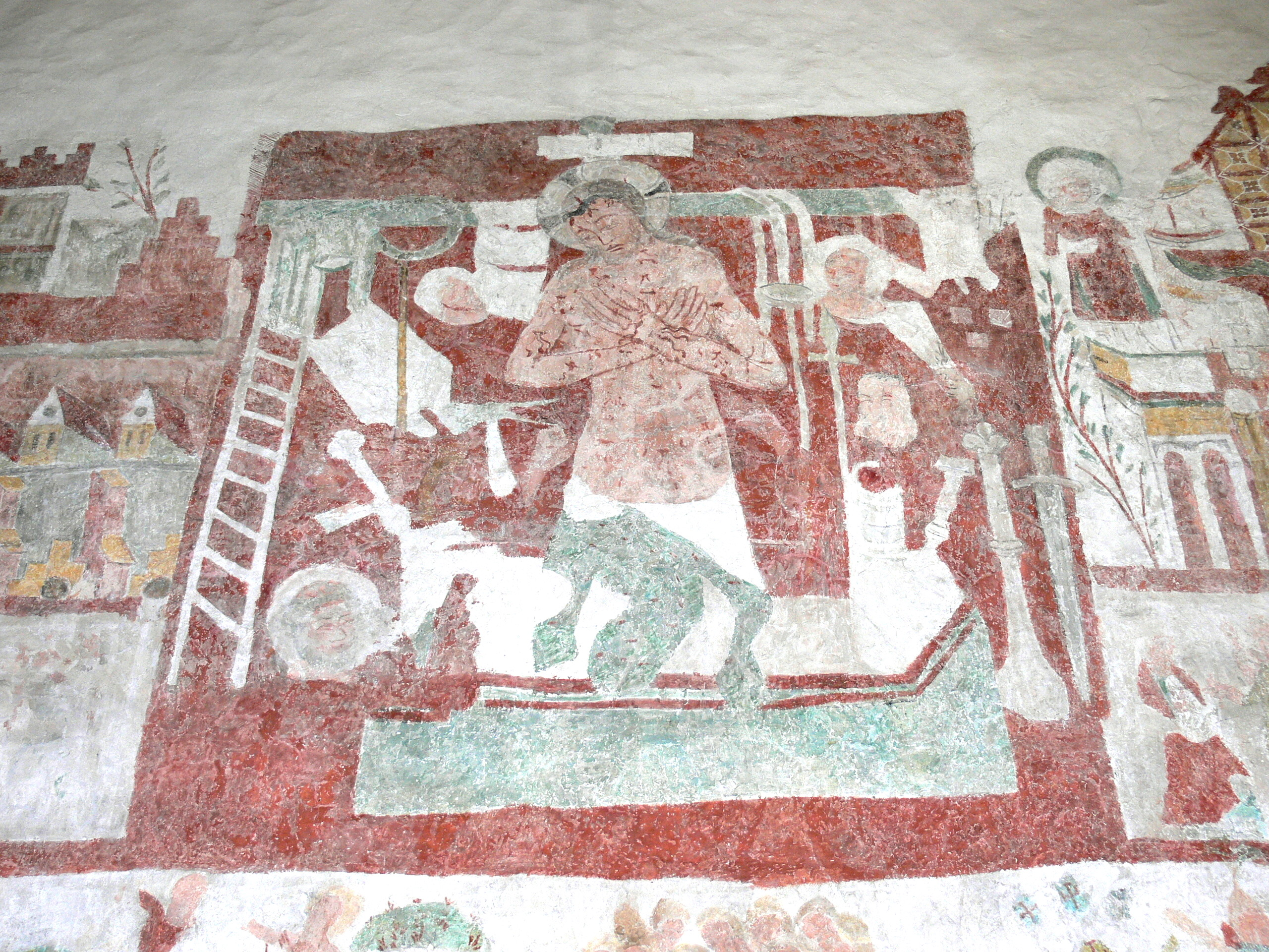 Bunge kyrka auf Gotland. Gotische Wandmalerei eines böhmischen Meisters: Gregorsmesse mit Arma Christi